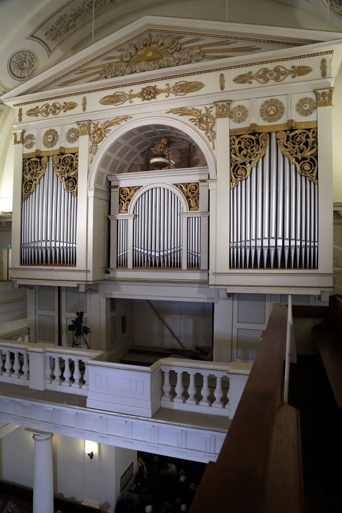 Deutschmann orgona ( 1931 ) a Kálvin téri református templom karzatán ( wikipédia)